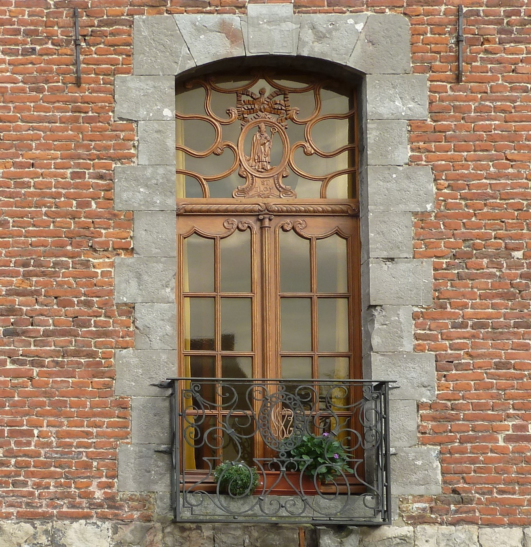 Baie vitrée de la brasserie de Bisiau Jenart, devenue brasserie Saint-Éloi à Vendegies-sur-Écaillon Nord.- France.